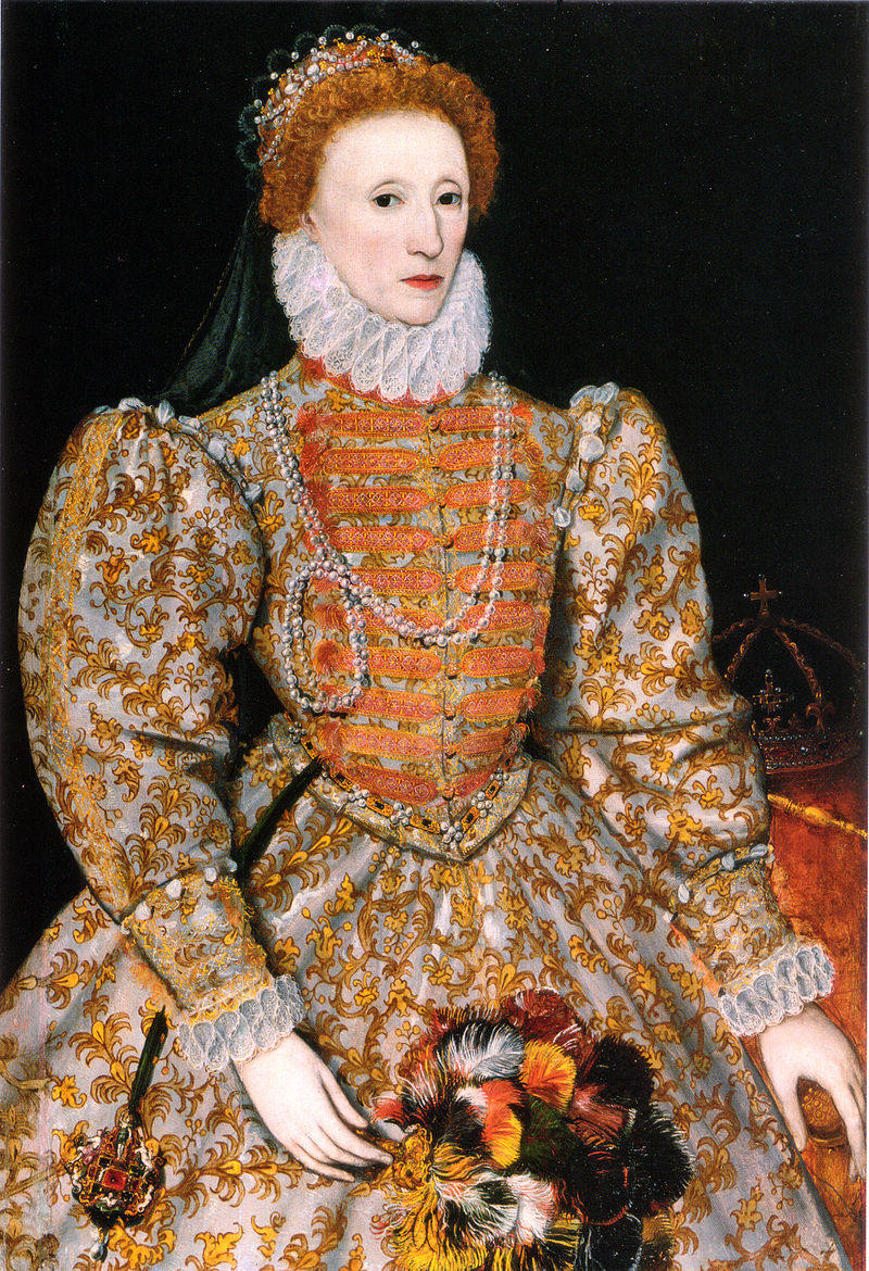 Reina Elizabeth I de Irlanda